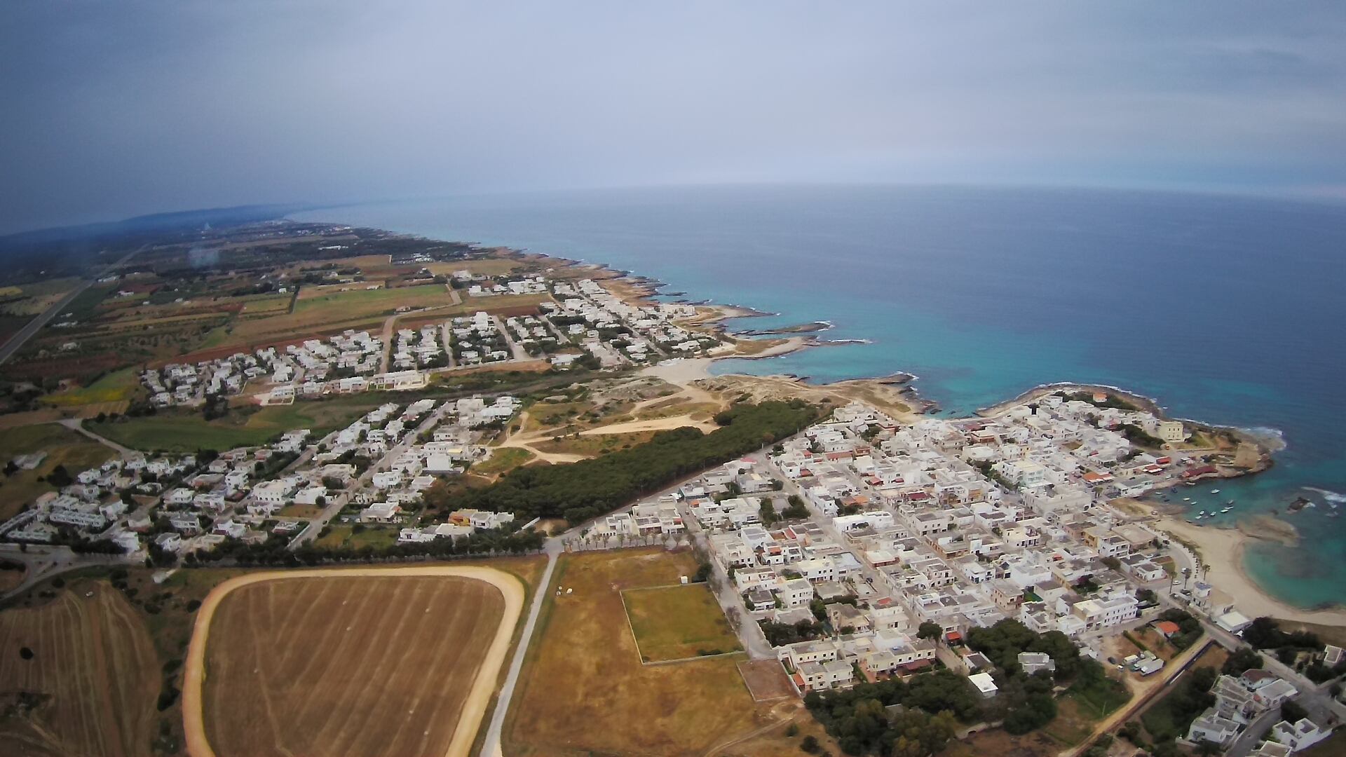 Torre Santa Sabina, veduta aerea